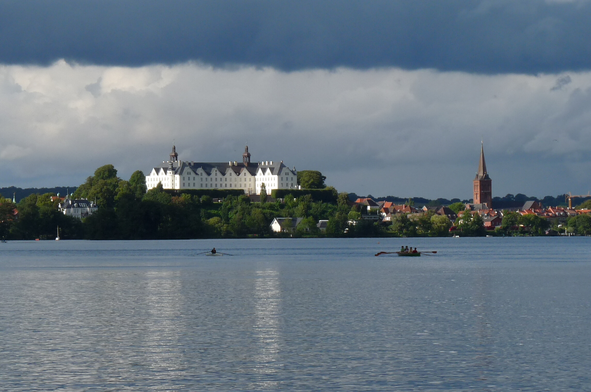 Schloss Plön, Blick von der Prinzeninsel